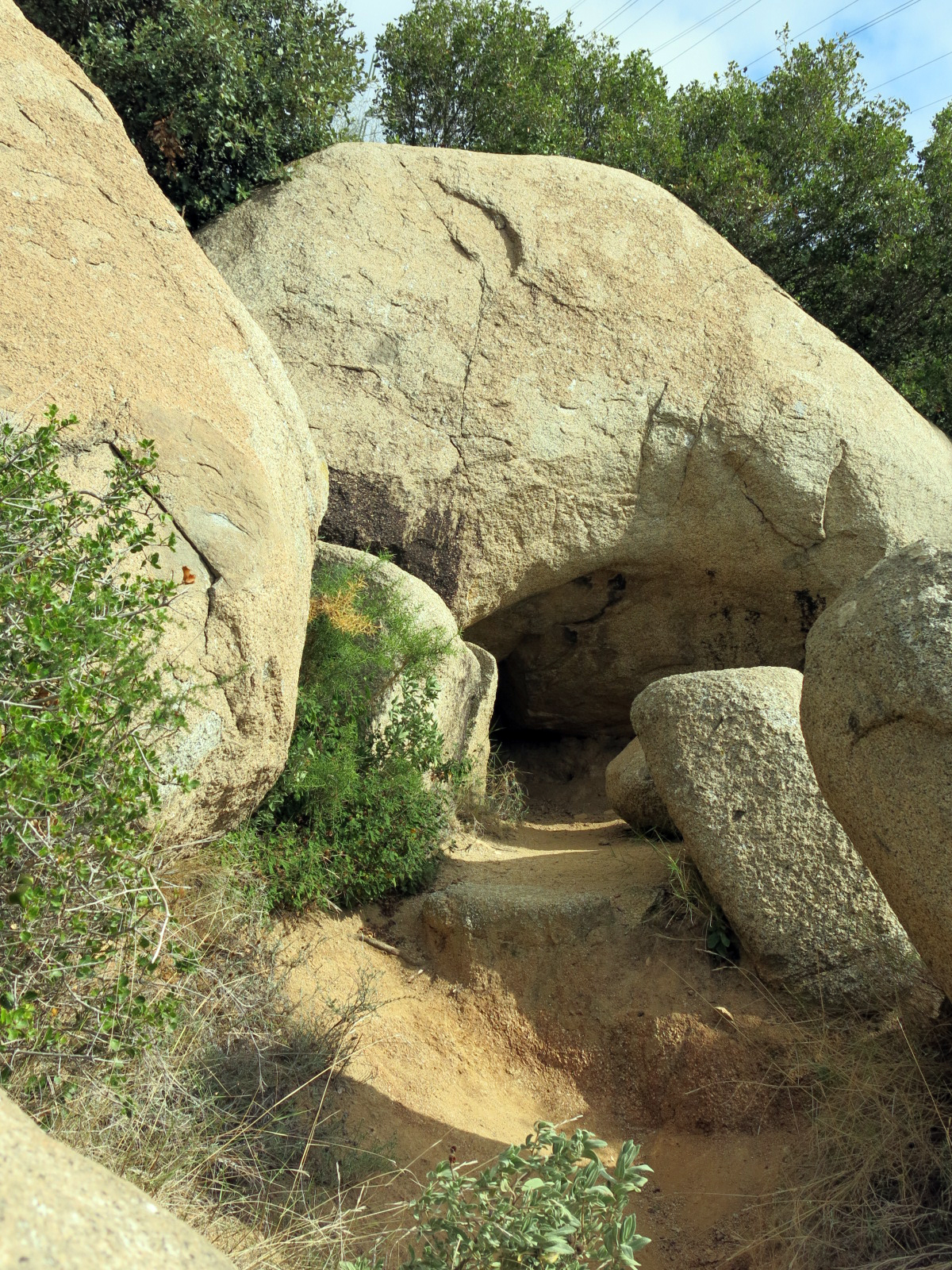 Cau d'en Genís (Badalona)